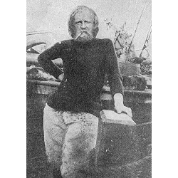 Rudolph Franke